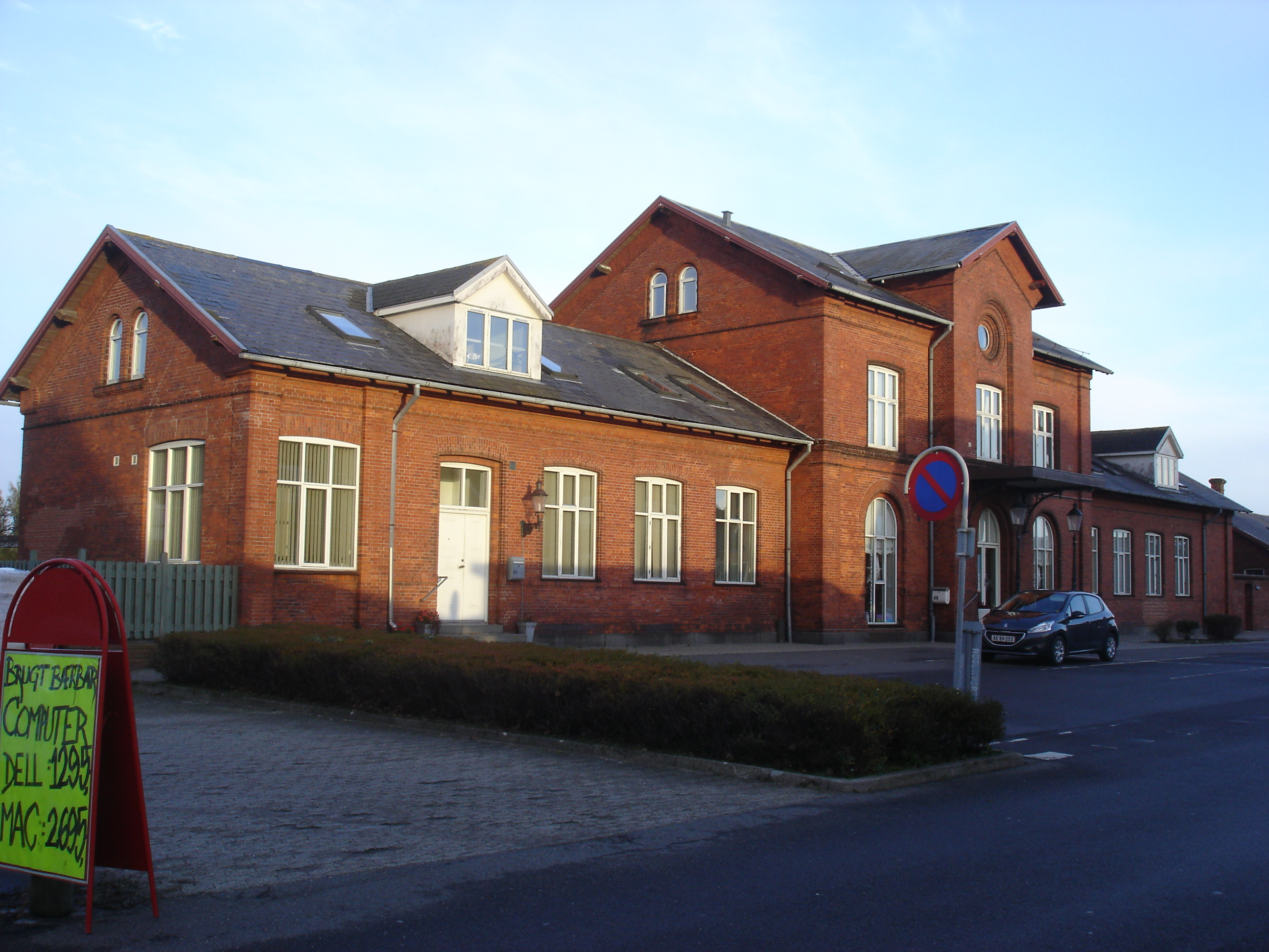 Løgstør Station fra vejsiden